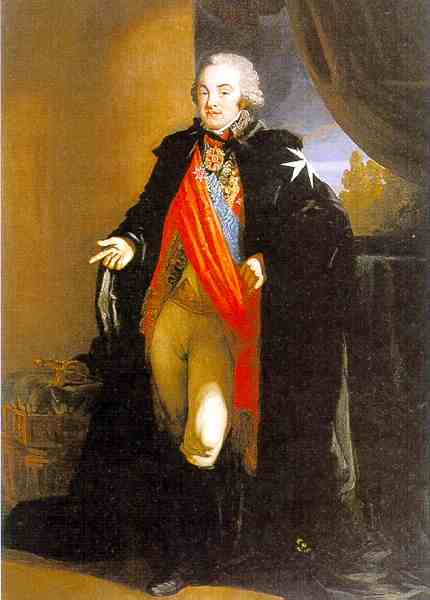 Н.П. Шереметьев